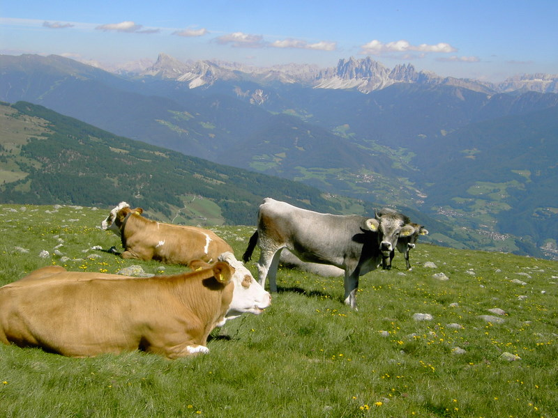 weidende Rinder auf der Alm